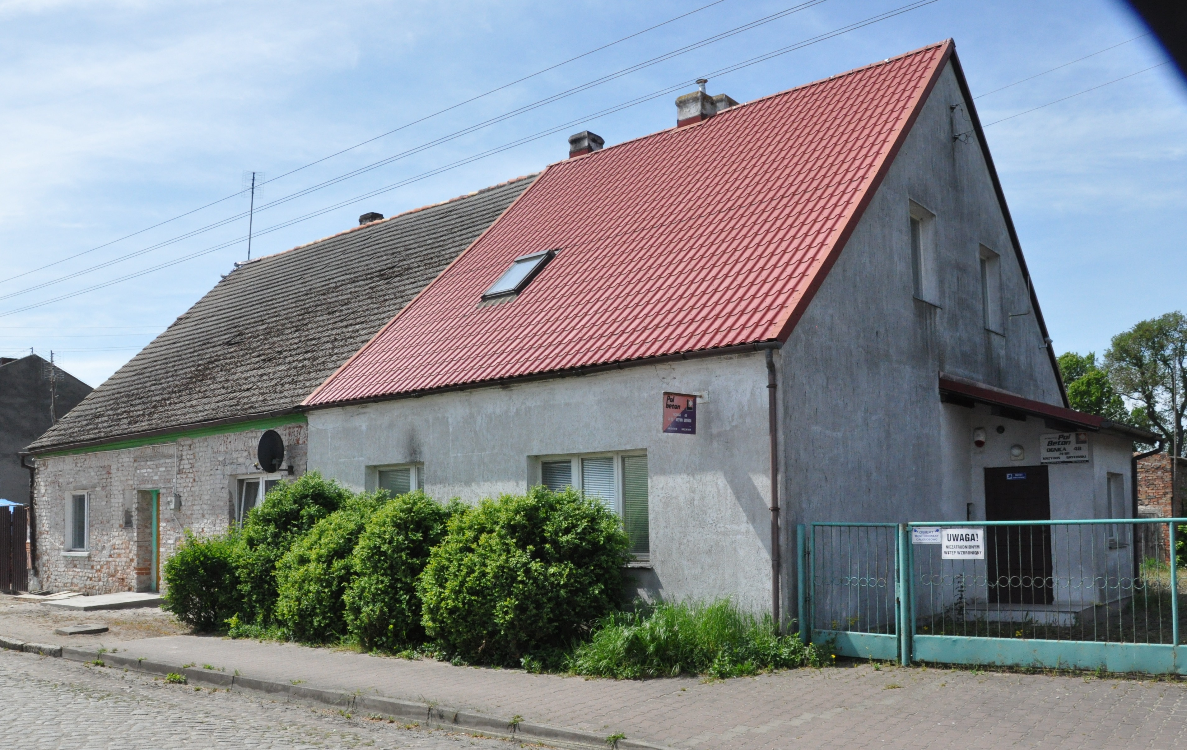 W tym domu w 1946 stacjonowała strażnica WOP